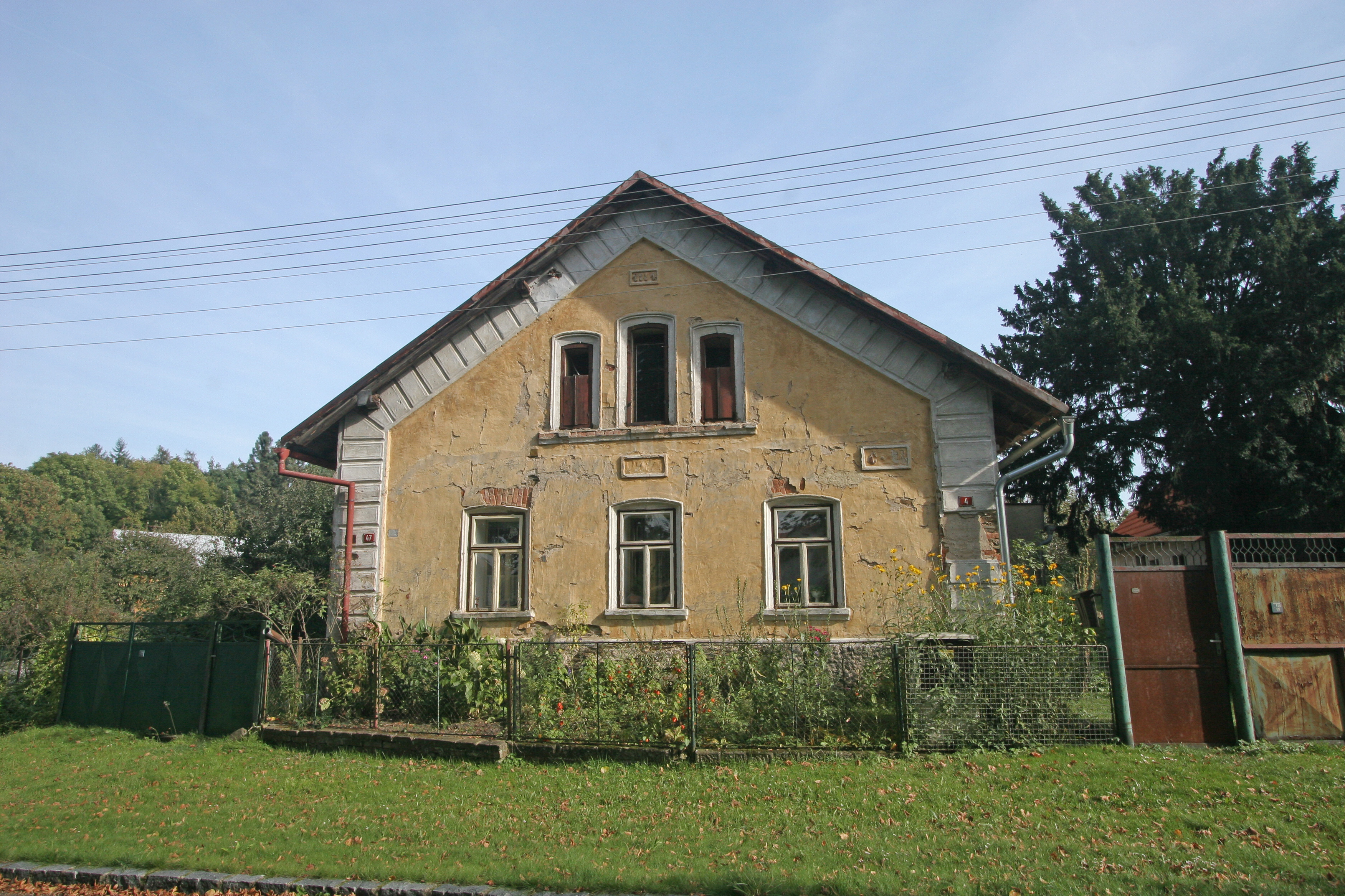 Morašice čp. 4